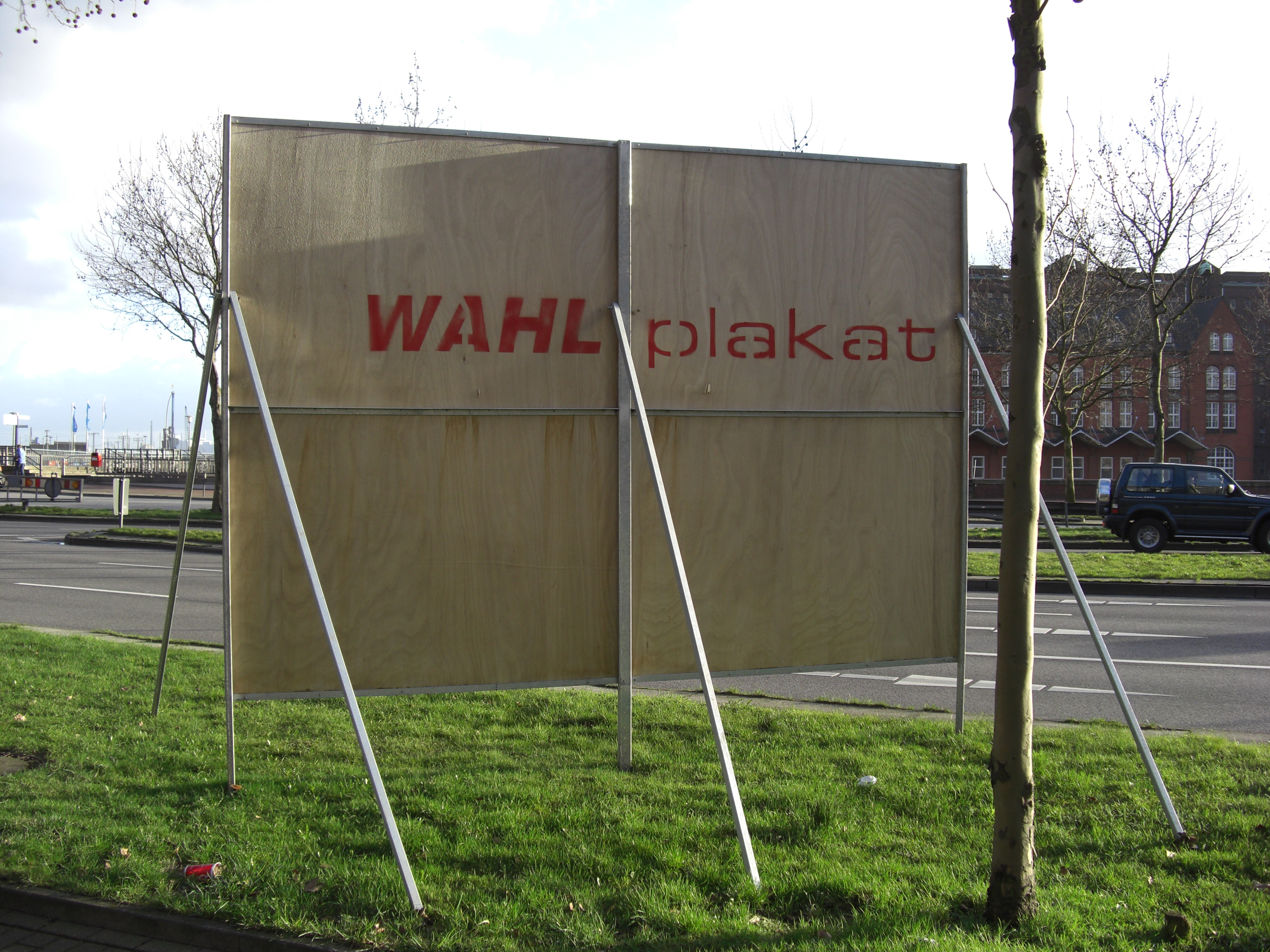 Großflächiges-Wahlplakt im Hamburger Bürgerschafts-Wahlkampf Februar 2008